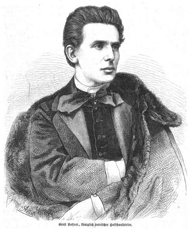 Ernst Possart, deutscher Schauspieler im 19. Jh.